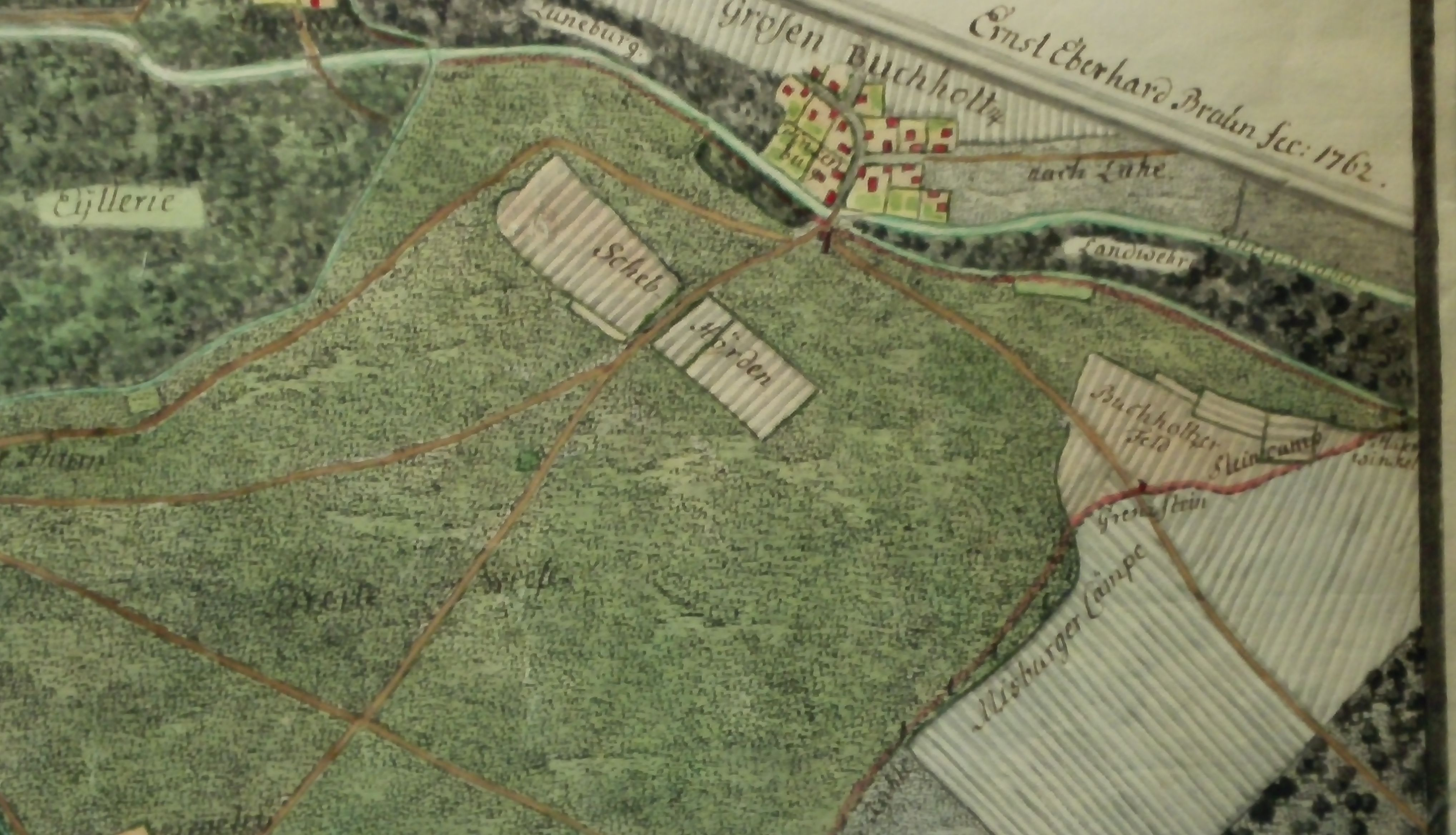 Ernest Eberhard Braun (auch: Ernst Eberhard Braun oder in der Signatur oft E. E. Braun) war im 17. und 18. Jahrhundert zur Zeit des Kurfürstentums Hannover ein deutscher Leutnant, Artillerie-Oberst, Planvermesser und Planzeichner mindestens in der Residenzstadt Hannover sowie in Einbeck ... Ausschnitt aus dem farbig gezeichneten Plan Situation der Stadt Hannover in specie derer Grenzen von Hude und Weide so der Alt-Städer Bürgerschaft in denen umliegenden Ämtern, theils Privative, Theils gemeinschaftlich zuständig ist, signiert mit „Ernst Eberhard Braun fec [fecit] 1762“. Ausschnitt „Großen Buchholtz“ (= Groß-Buchholz mit Angaben weiterer Örtlichkeiten wie Pinkenburg, Schiffgraben, Lüneburger Landwehr, Lahe.